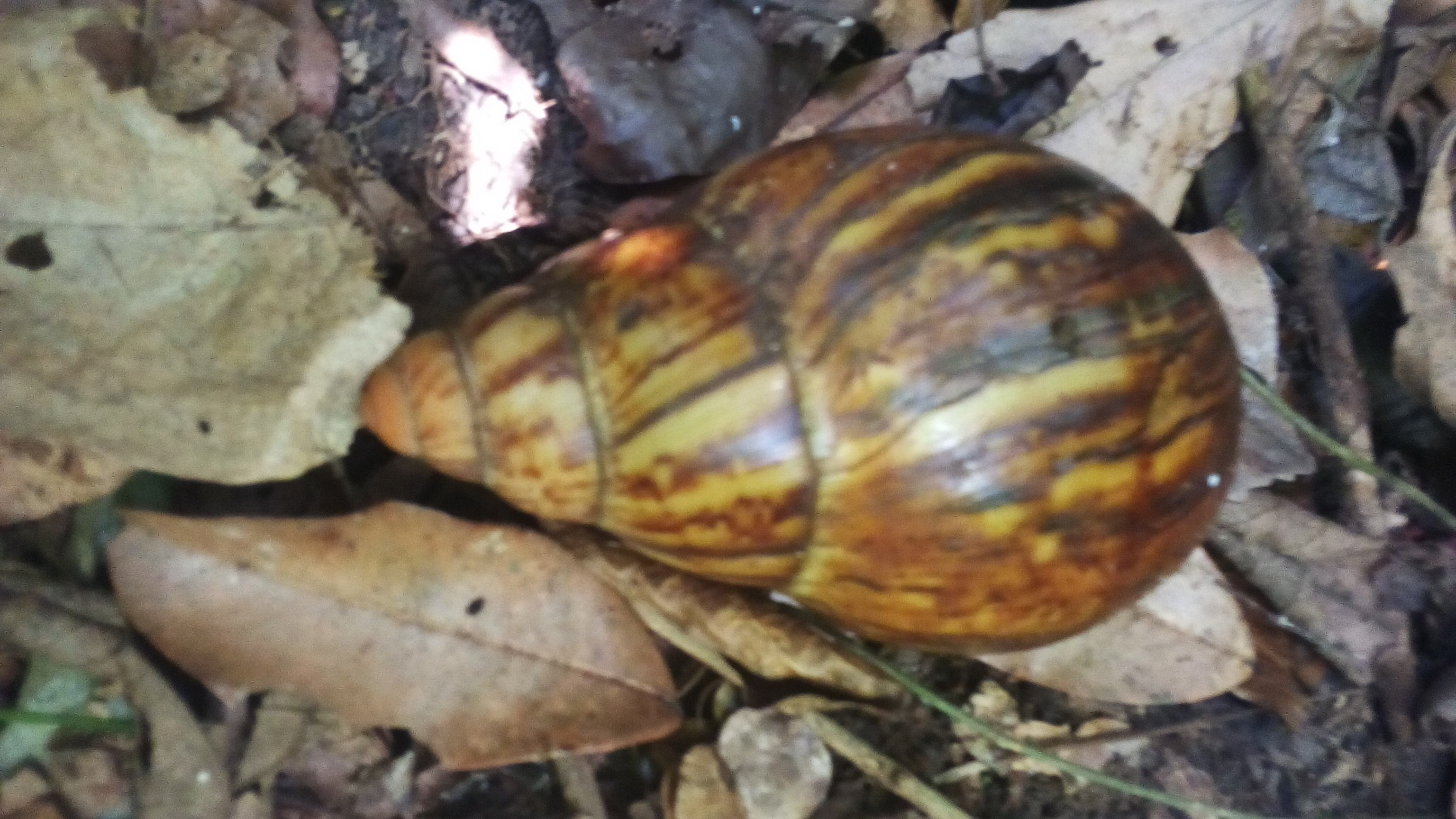 Escargot trouver dans la forêt relique de Niaouli